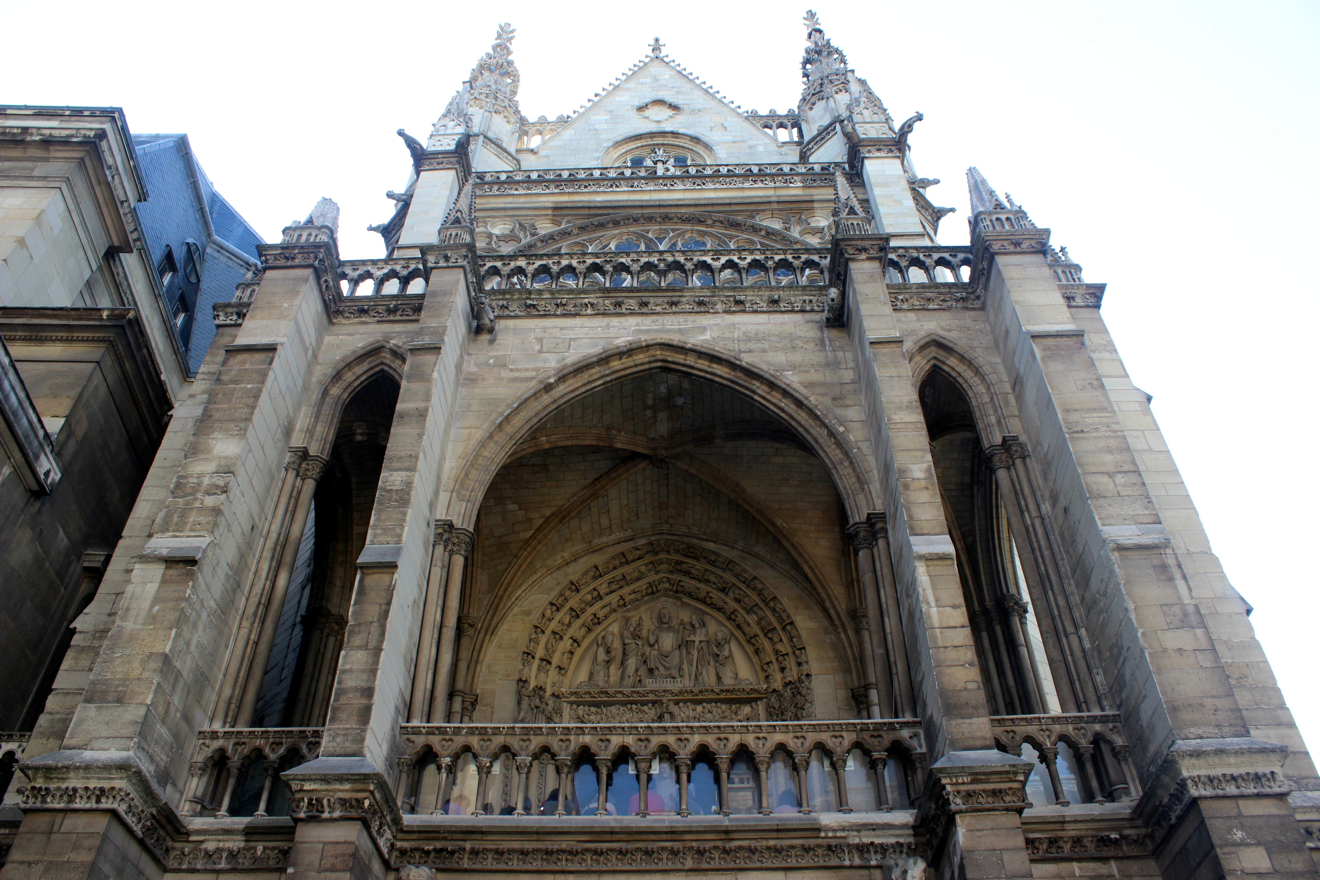 París. Sainte Chapelle.